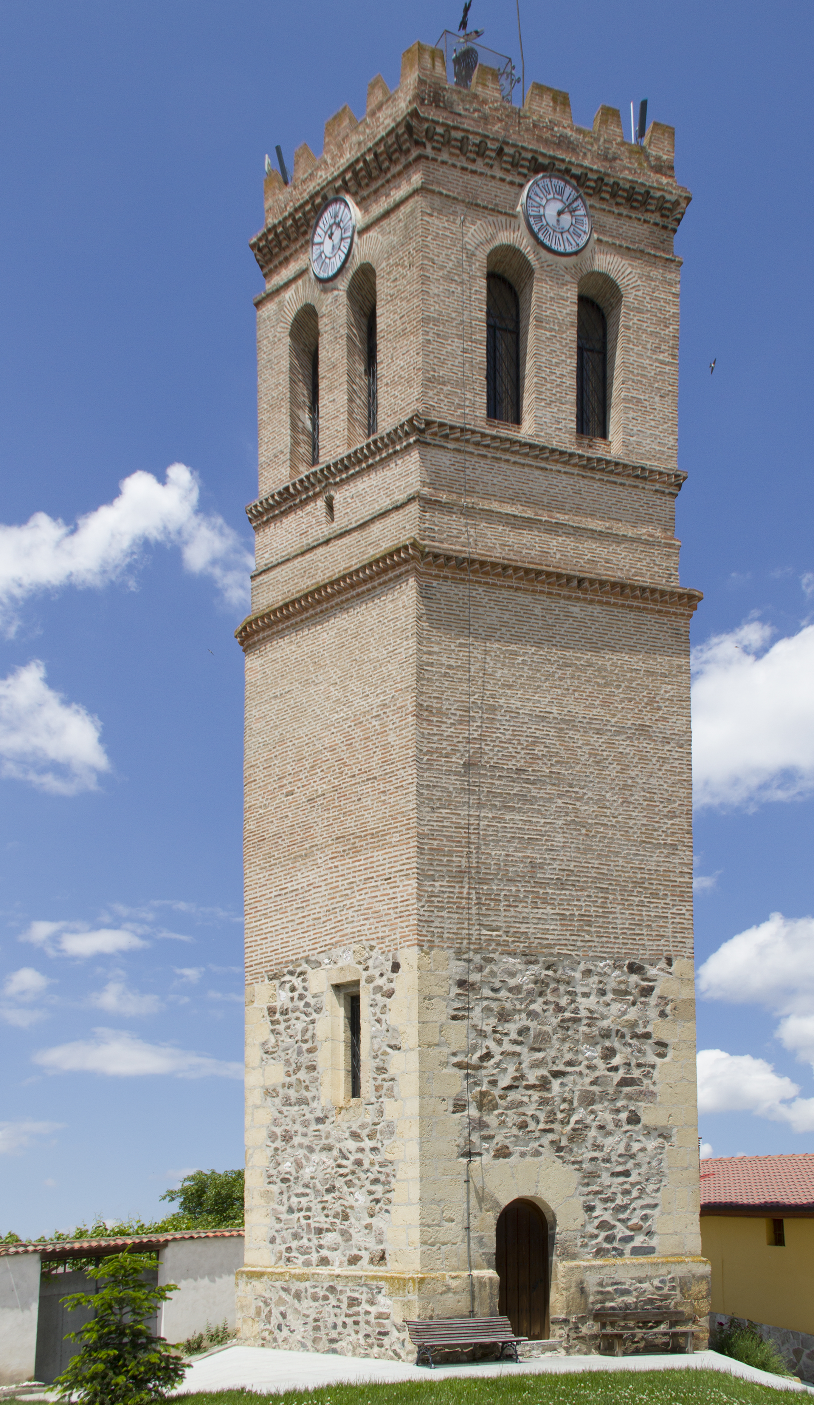 Navas de Oro